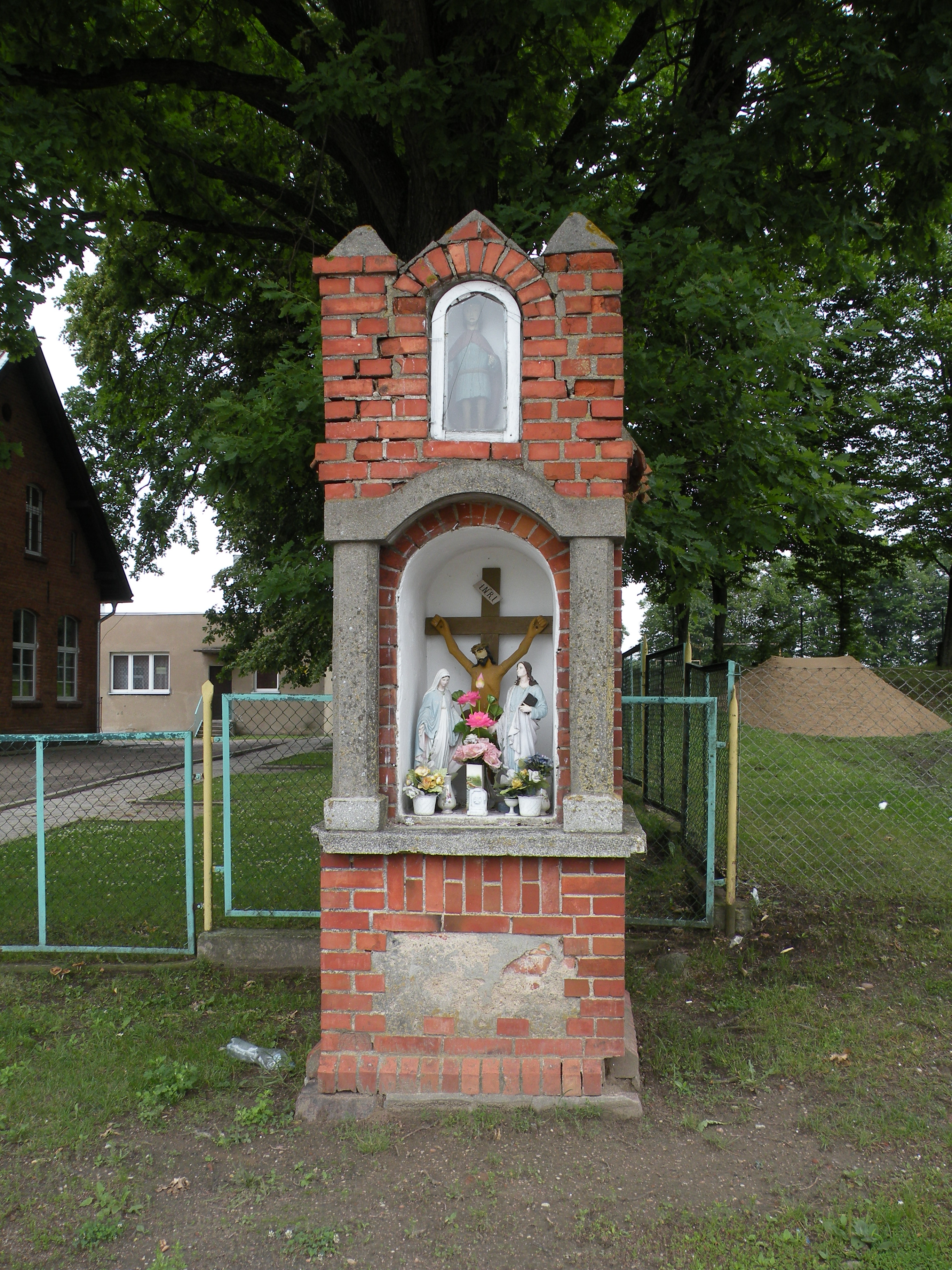 Bredynki